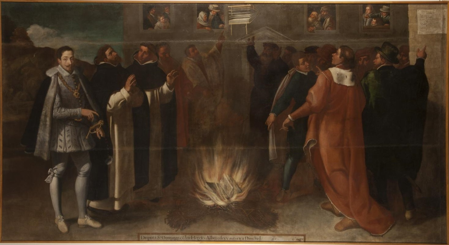 La obra representa a Santo Domingo de Guzmán, el fundador de la Orden de Santo Domingo, disputando con los albigenses.